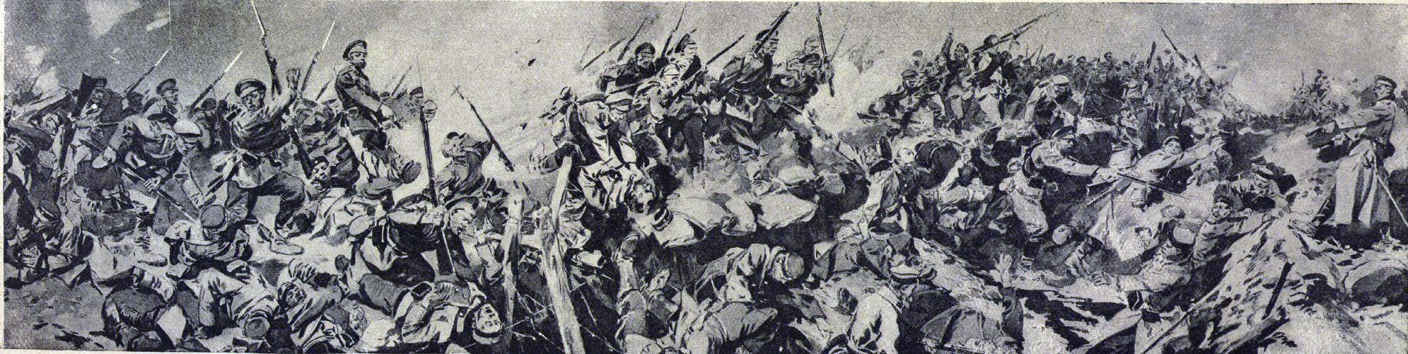 «Атака наших войск под Барановичами» // Великая война в образах и картинах : [в 14 вып.] / под ред. Ив. Лазаревского. — М.: Издание Д. Я. Маковского, 1914-1917 (Товарищество типографии А. И. Мамонтова); [Вып. 11]. — 1916 — С.125.